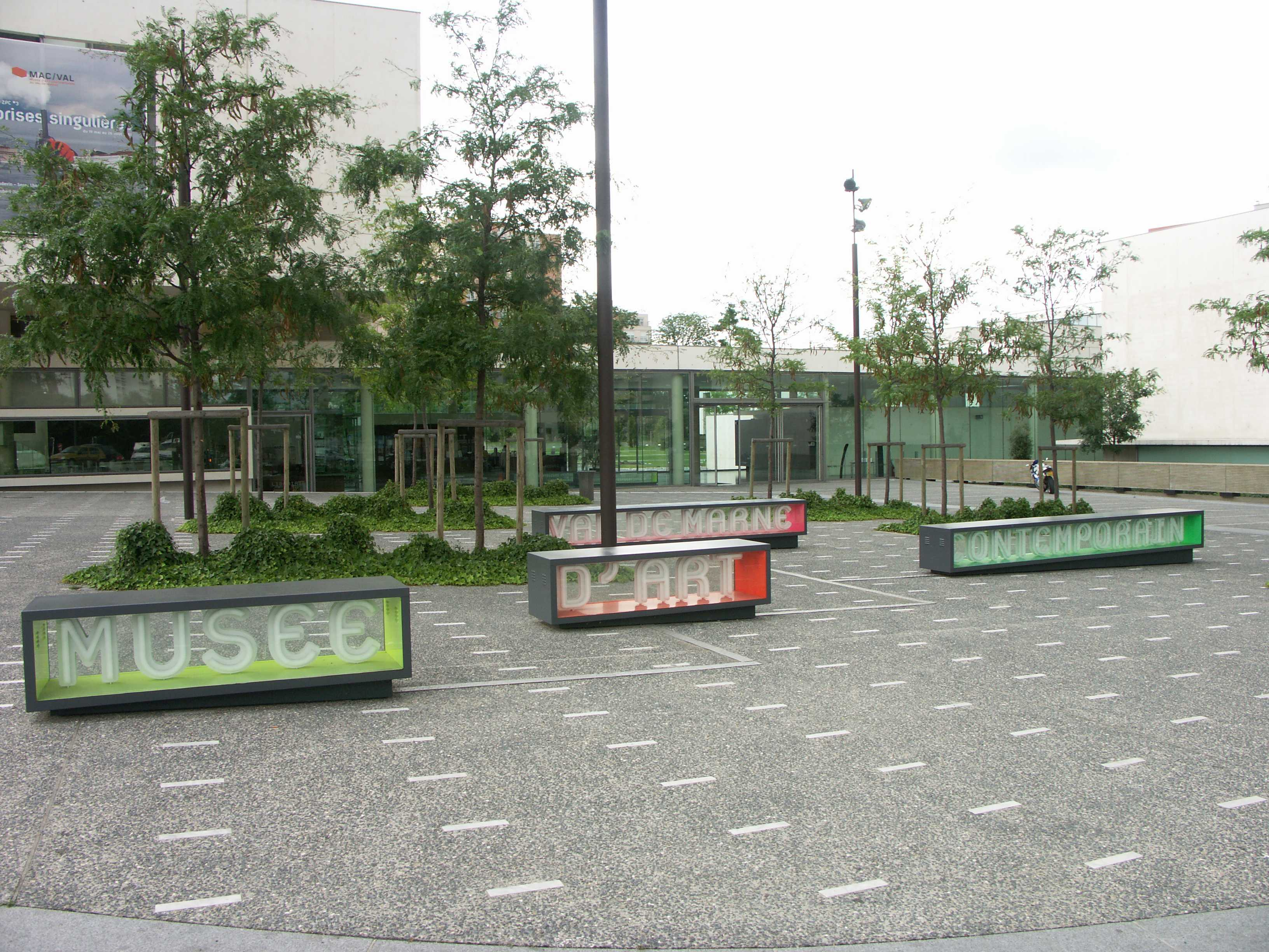 Vitry sur Seine - Musée d'art contemporain - Panneau d'entrée